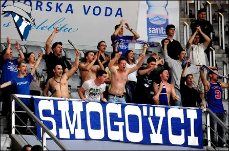 Smogovci Zagreb, prva utakmica u Zadru 2012, Dvorana Krešimira Ćosića